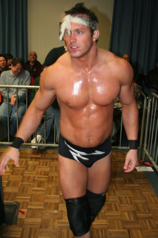 Mike Bennett, February 21, 2009.